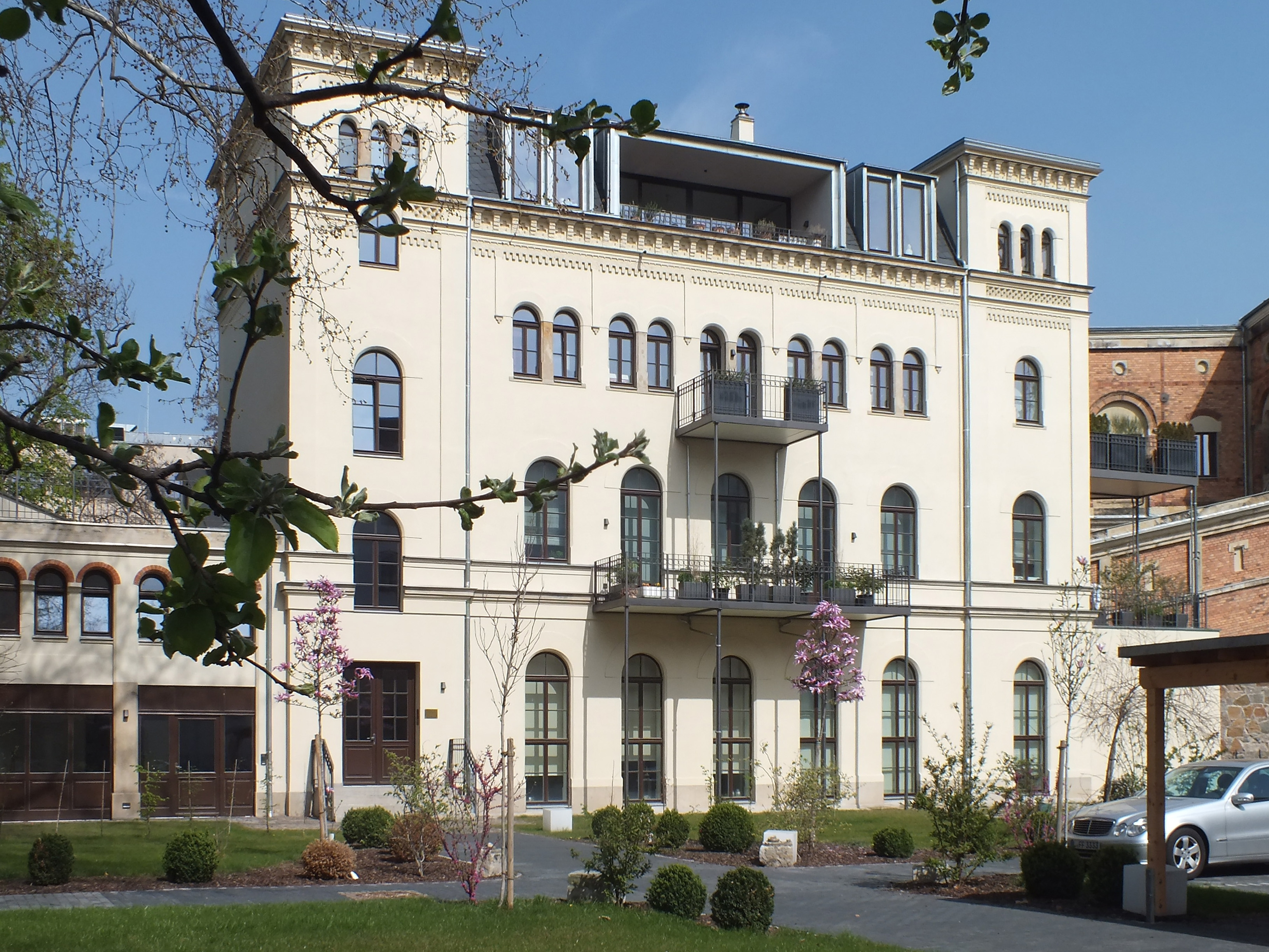 Das noch erhaltene ehemalige Papierlager des Verlages Ernst Keil, der die erste Illustrierte Deutschlands, die "Gartenlaube" herausbrachte, in der Goldschmidtstraße 33 in Leipzig. Die ehemalige Villa des Verlegers selbst, die man sich als vor dem Gebäude, also wo jetzt Parkplatz und Fußweg zum Haus sich befinden, stehend vorstellen muss, wurde im Zweiten Weltkrieg vollständig zerstört. Heute wird sowohl dieses als auch das links neben diesem stehende ehemalige Nebenhaus der Villa Keil als Wohnhaus genutzt (pro Etage jeweils eine Wohnung).